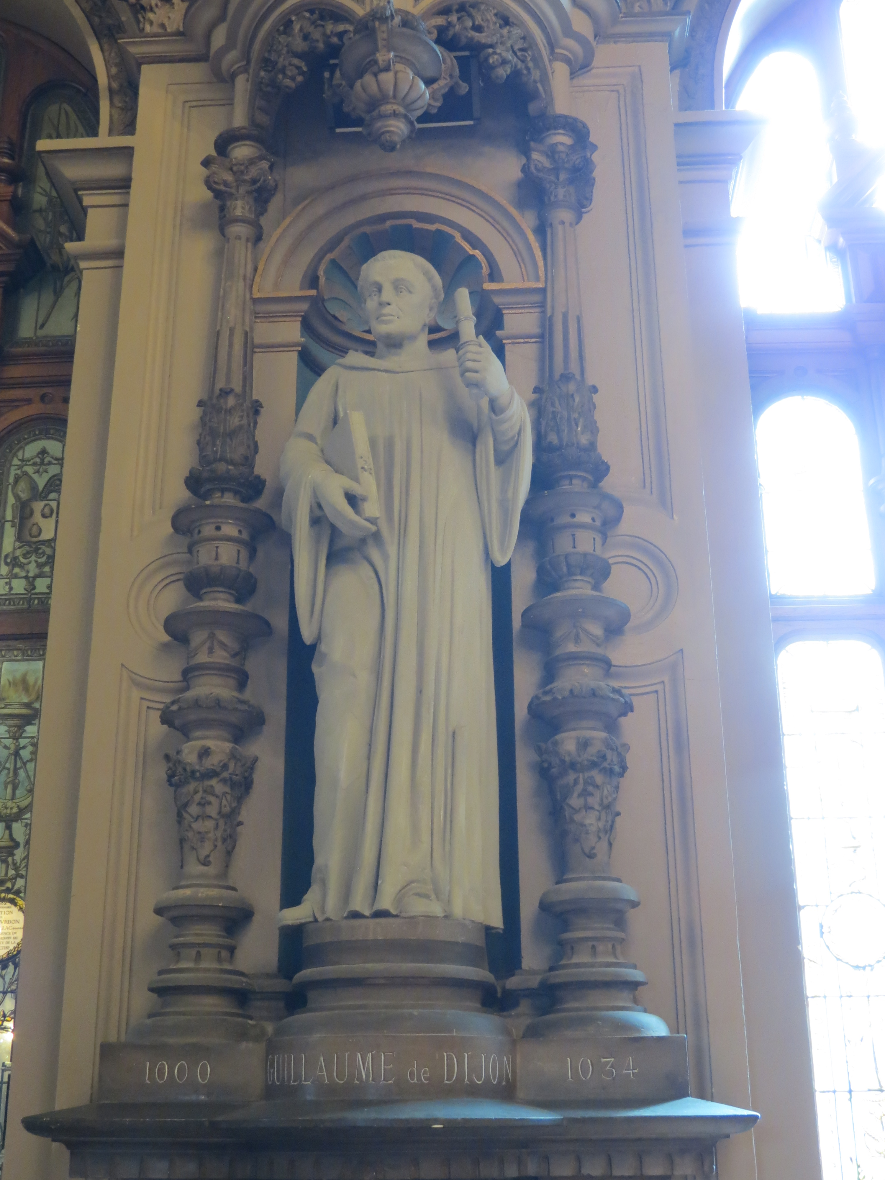 Guillaume de Volpiano dit Guillaume de Dijon, premier abbé de Fécamp (1001-1028).